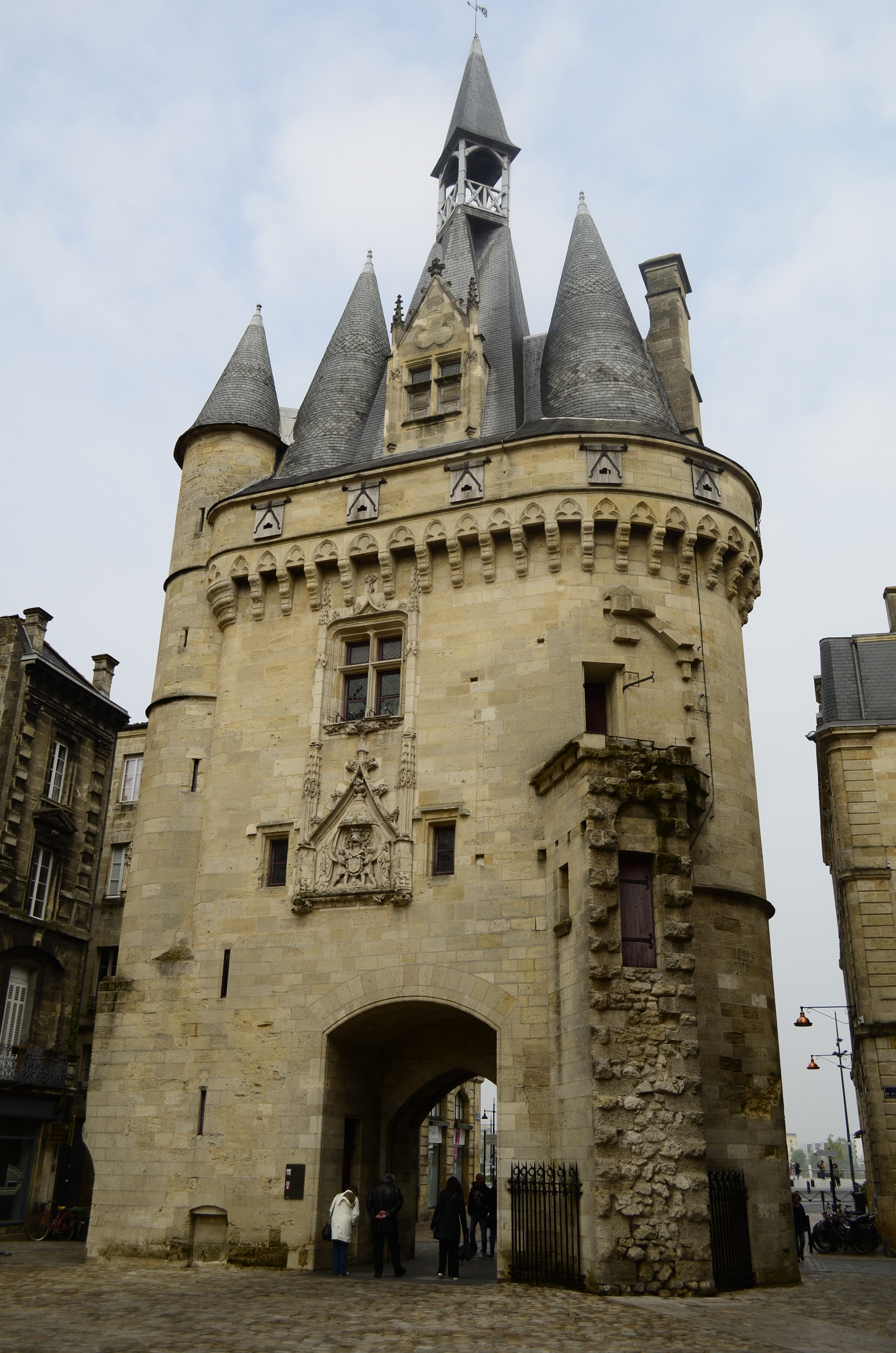 Porte Cailhau (Classé) .